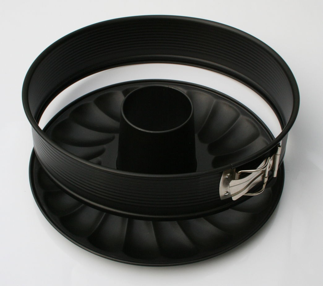 Backform mit Rohrboden